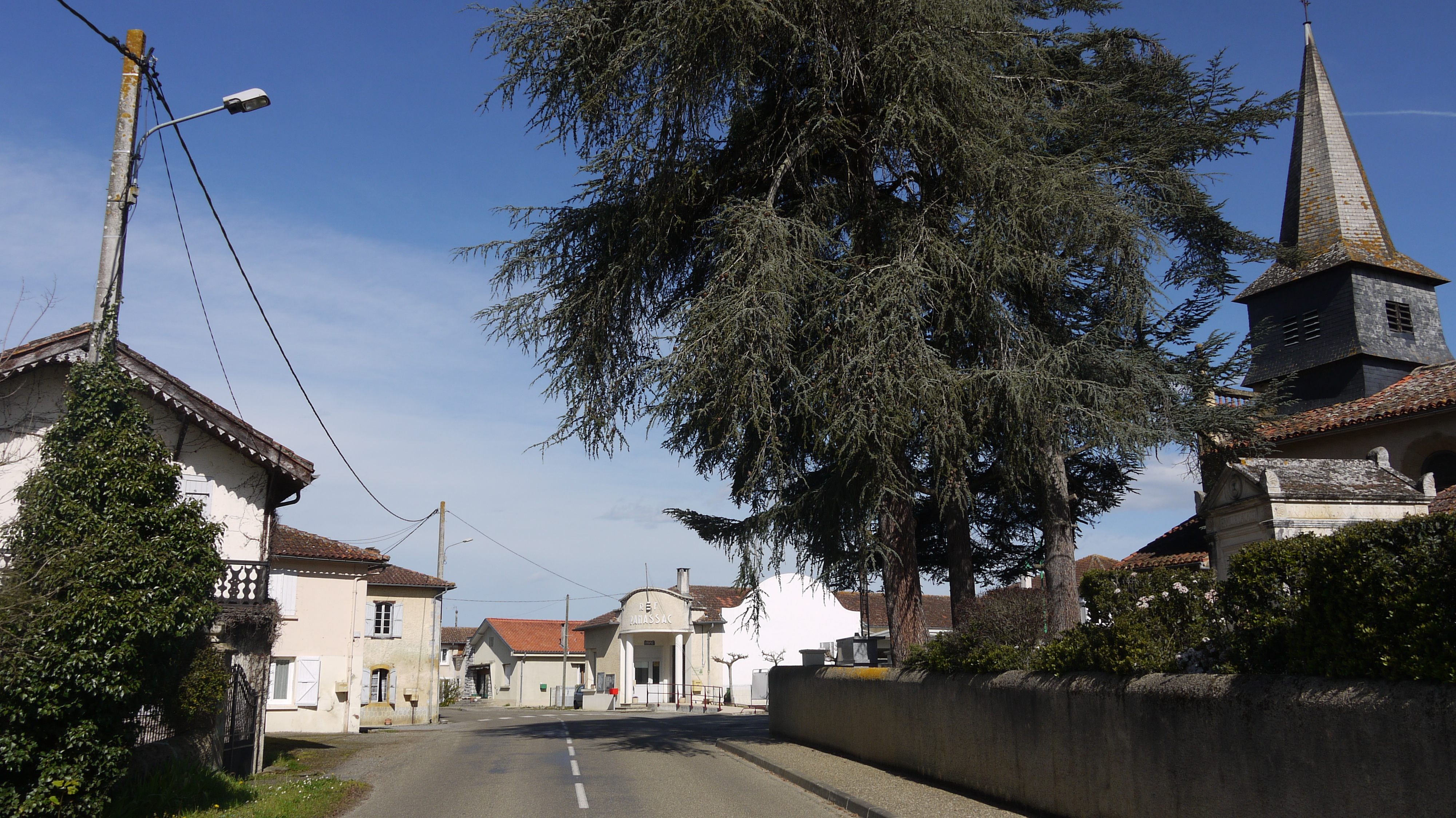 La rue principale de Panassac, avec à droite l'église et au fond la mairie.